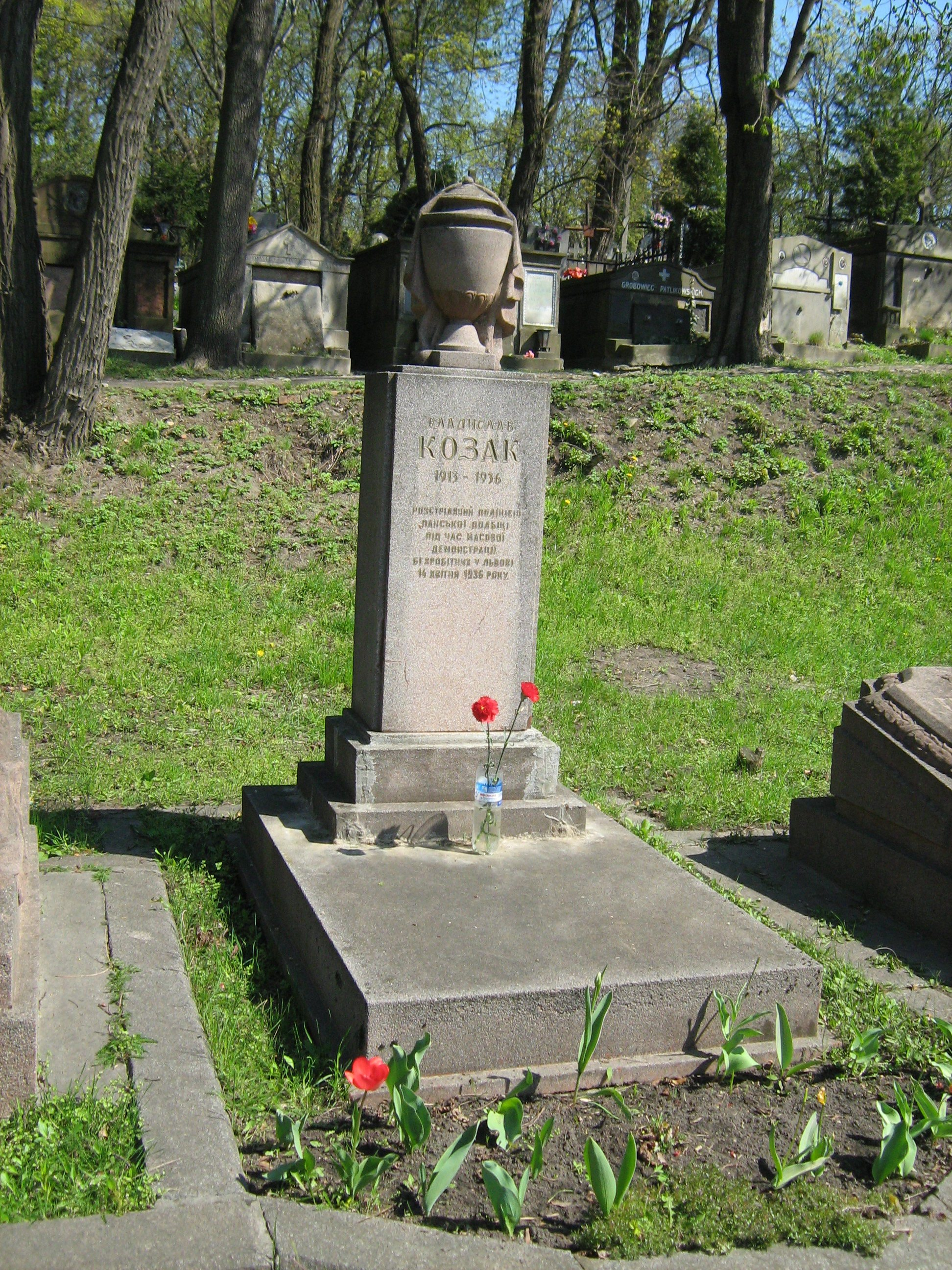 Обелиск на могиле безработного Владислава Козака, убитого польской полицией при расстреле 50-тысячной демонстрации безработных 14.04.1936 г.